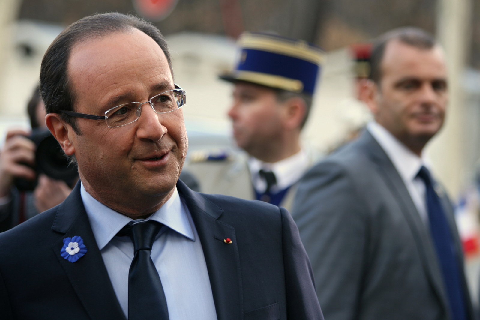 François Hollande lors des cérémonies du 11 novembre 2012